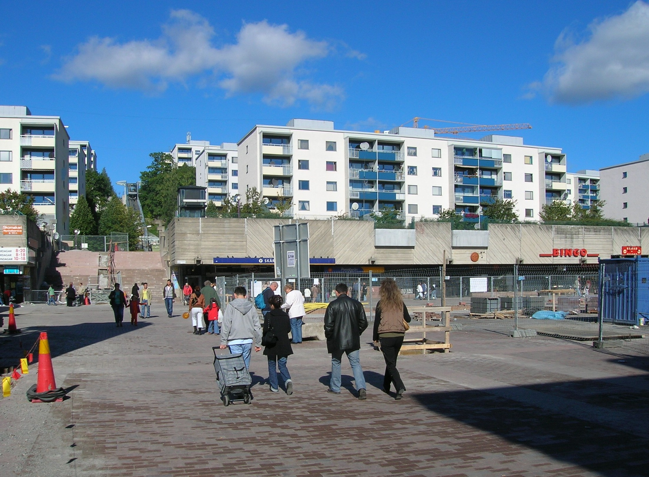 Skärholmsstorget, Skärholmen, Stockholm